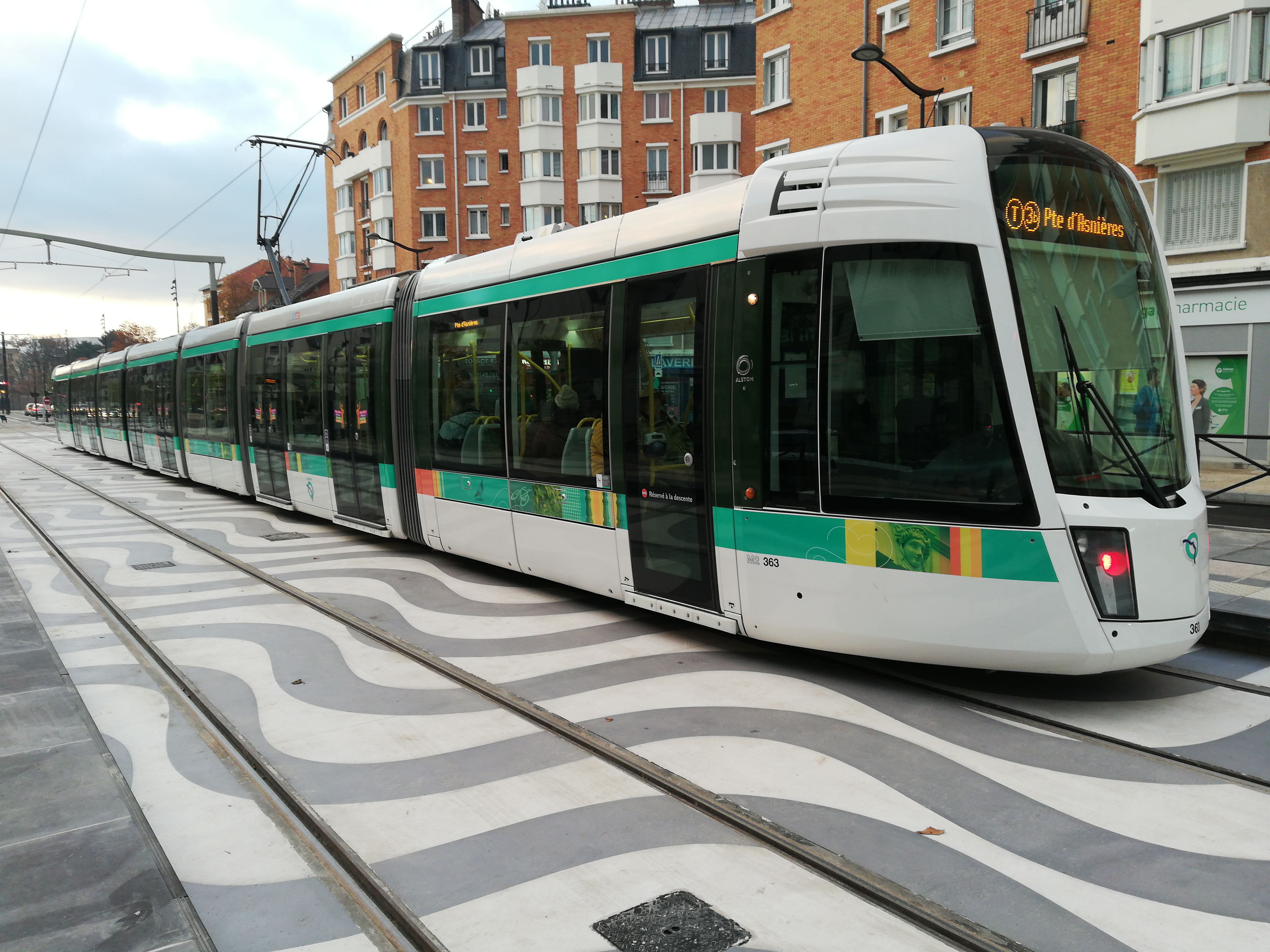 Un Citadis 402 à la station Épinettes - Pouchet de la ligne 3b du tramway d'Île-de-France, le jour du prolongement de la ligne de Porte de la Chapelle à Porte d'Asnières, en 2018.